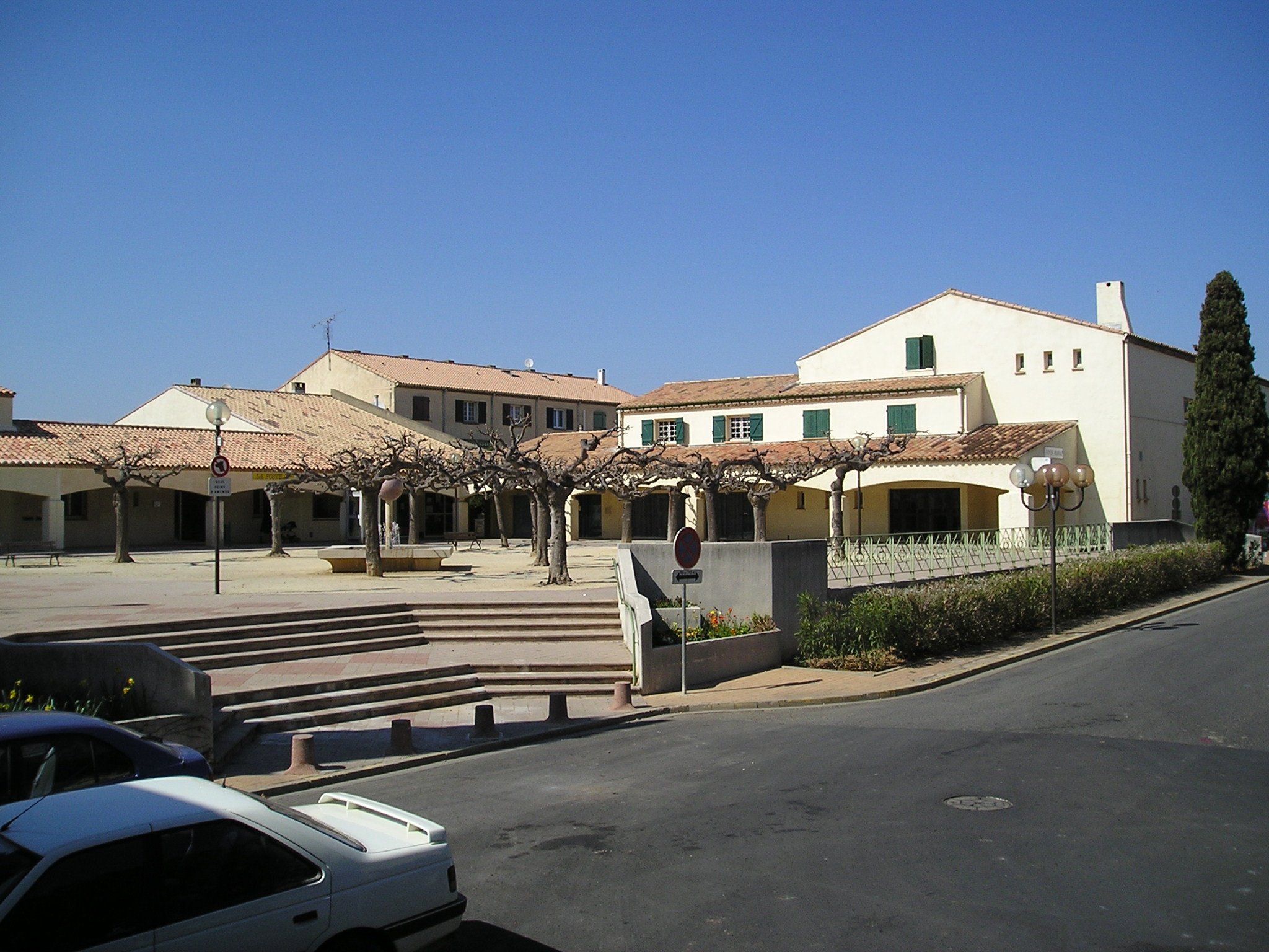 La place des Arcades à Maurin, commune de Lattes, est la première place commerçante dans l'histoire du village créé en 1965. A gauche, le bureau de poste, la mairie annexe au centre, le bâtiment-gymnase du Foyer rural de Maurin à gauche, le long de la rue des Cévennes (voir ici). L'escalier au premier plan est un réaménagement de la seconde moitié des années 1990.